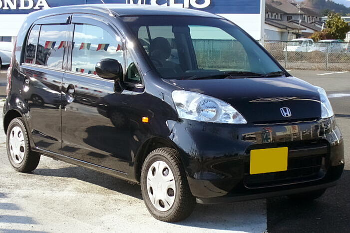 4代目ホンダ・ライフ（後期型）